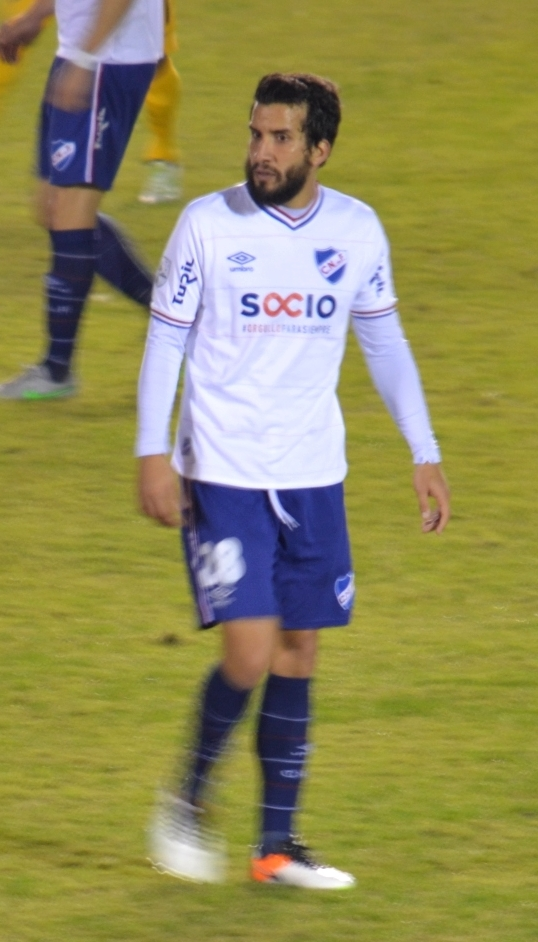 Imagen del partido disputado entre Nacional y Boca Juniors, en el estadio Gran Parque Central, por los cuartos de final de la Copa Libertadores 2016